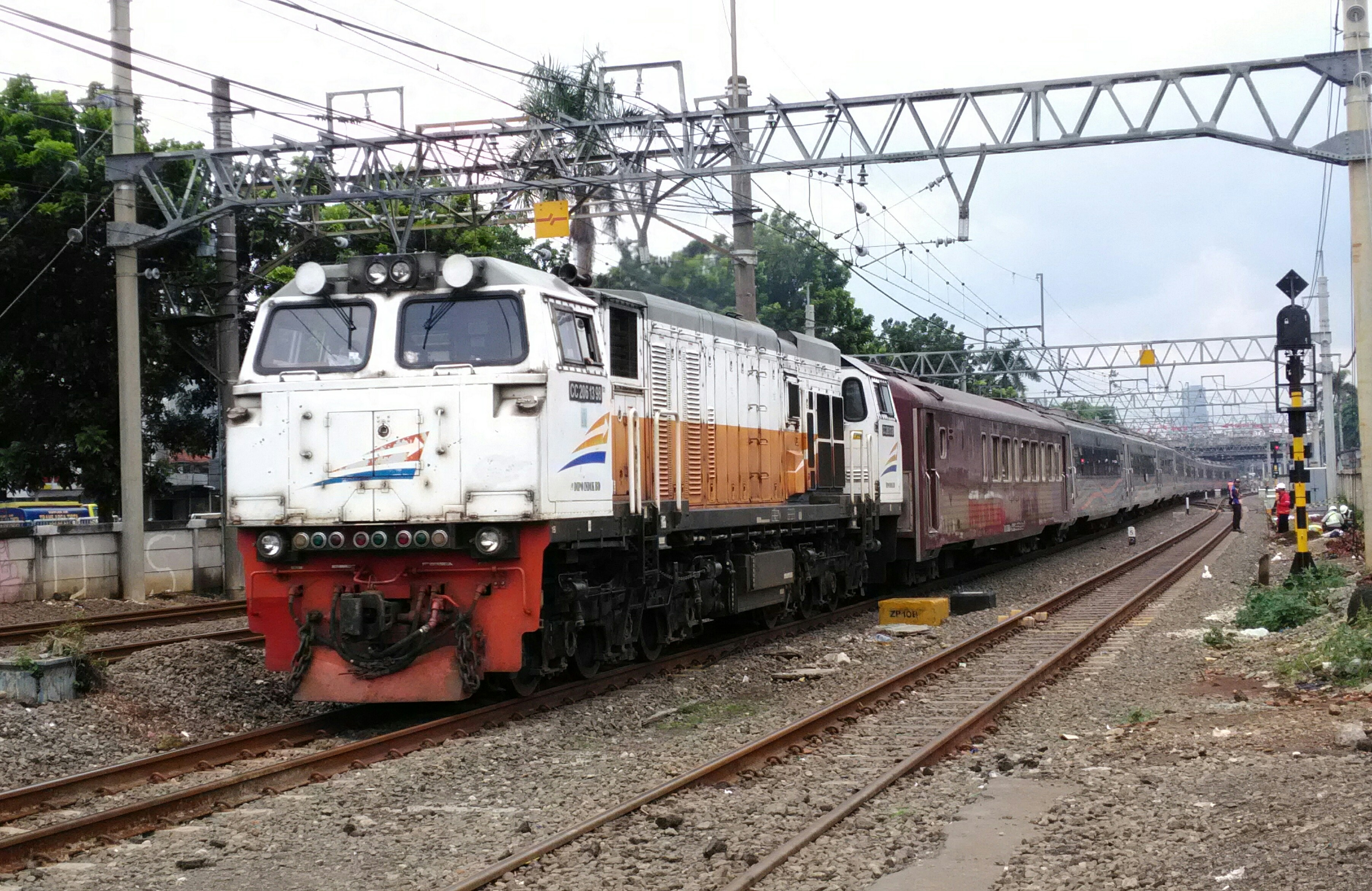 Sunda: KA Argo Parahyangan ngaliwat ex JPL 52 Cipinang